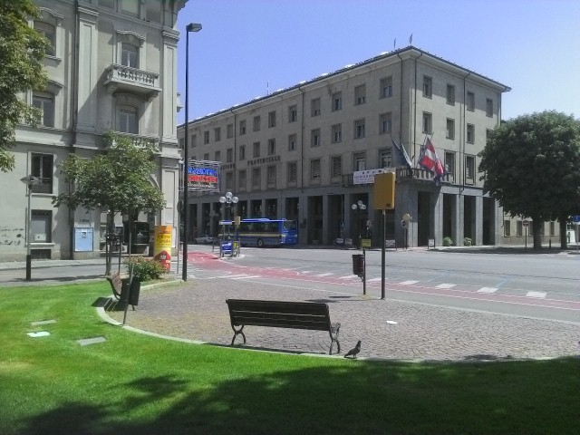 Placette centre ville cuneo